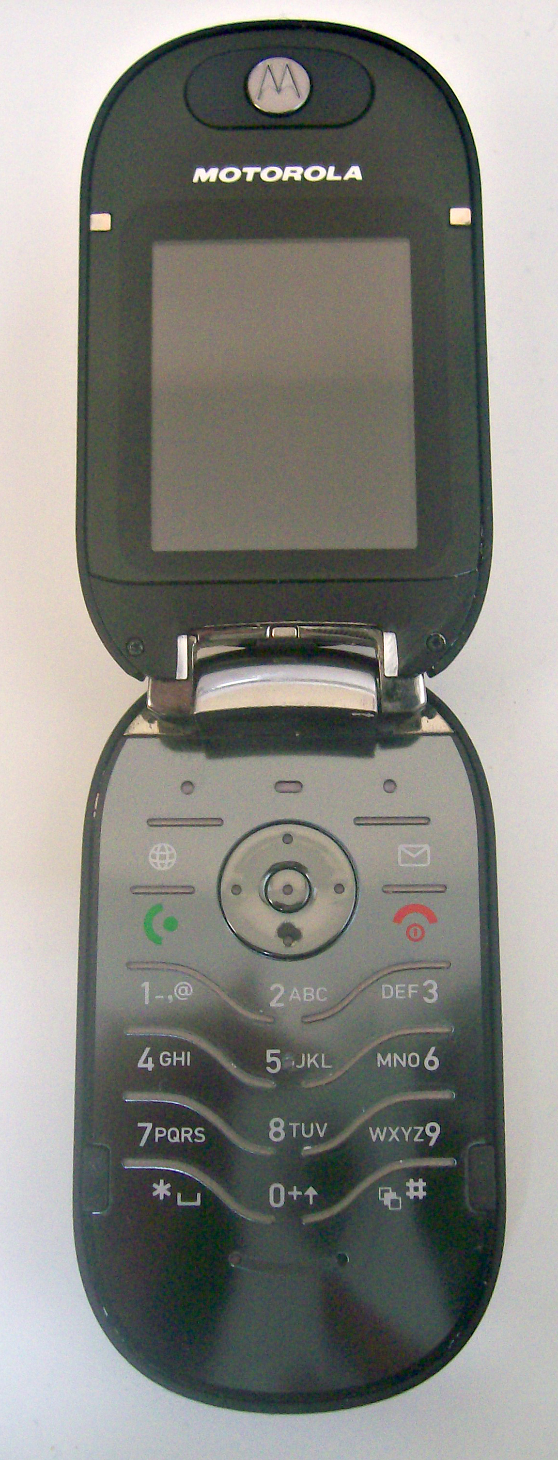 Fotografia del modelo U6 de Motorola abierto